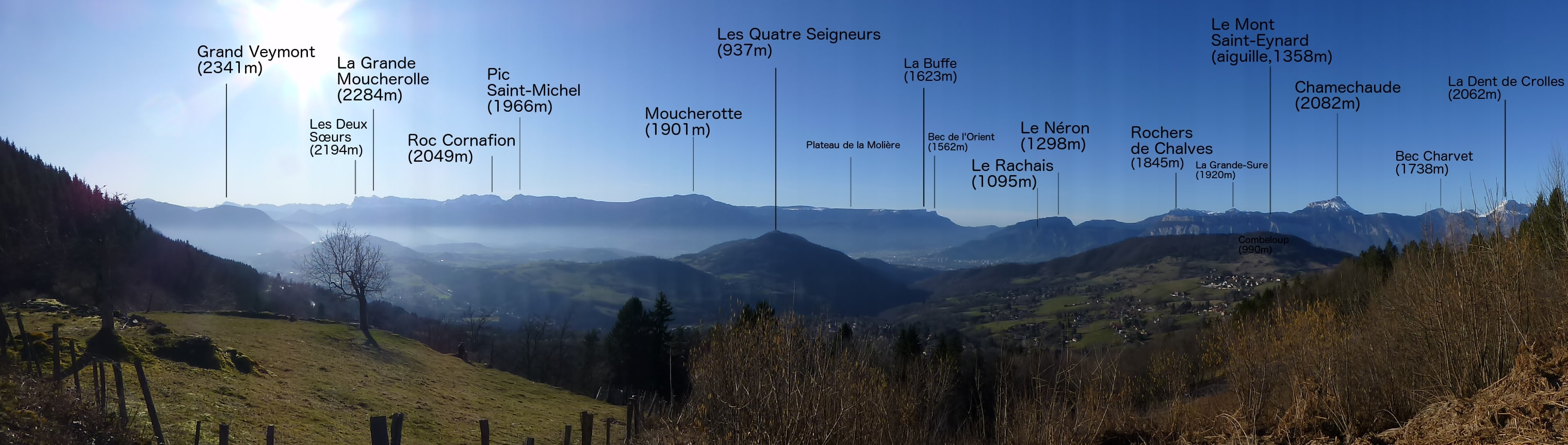 Panorama Vercors-Chartreuse, autour de Grenoble, depuis la table d'orientation des Seiglières, Saint-Martin-d'Uriage, Isère, Auvergne-Rhône-Alpes, France. (Malgré le soin apporté à cette image, si vous constatez une erreur de placement, merci de me le faire savoir par message)